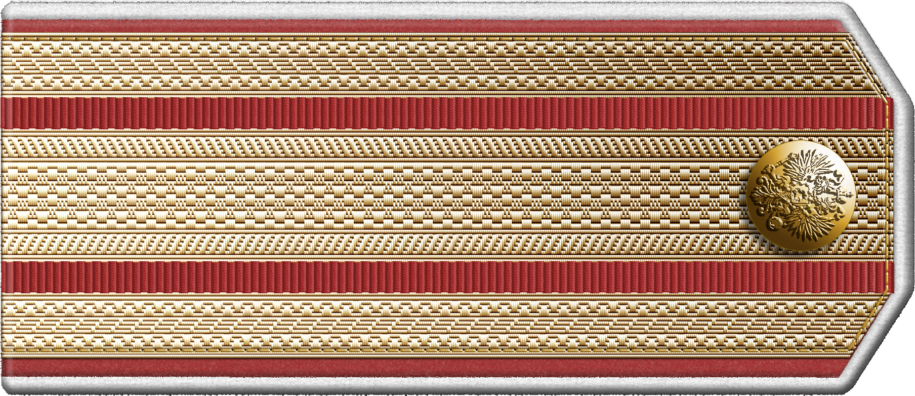 Российская Империя. Российская Императорская армия Род войск/служба: военно-учебные заведения. Воинская часть: Главная гимнастическо-фехтовальная офицерская школа (ГГФОШ) Знаки различия: погоны по состоянию на 1909-1917 г. Чин/звание: Полковник (начальник школы). Первичные источники: Полное собрание Законов Российской Империи, собр.3, № 31891 от 17 мая 1909 г. Полное собрание Законов Российской Империи, собр.3, № 36950 от 27 апреля 1912 г.